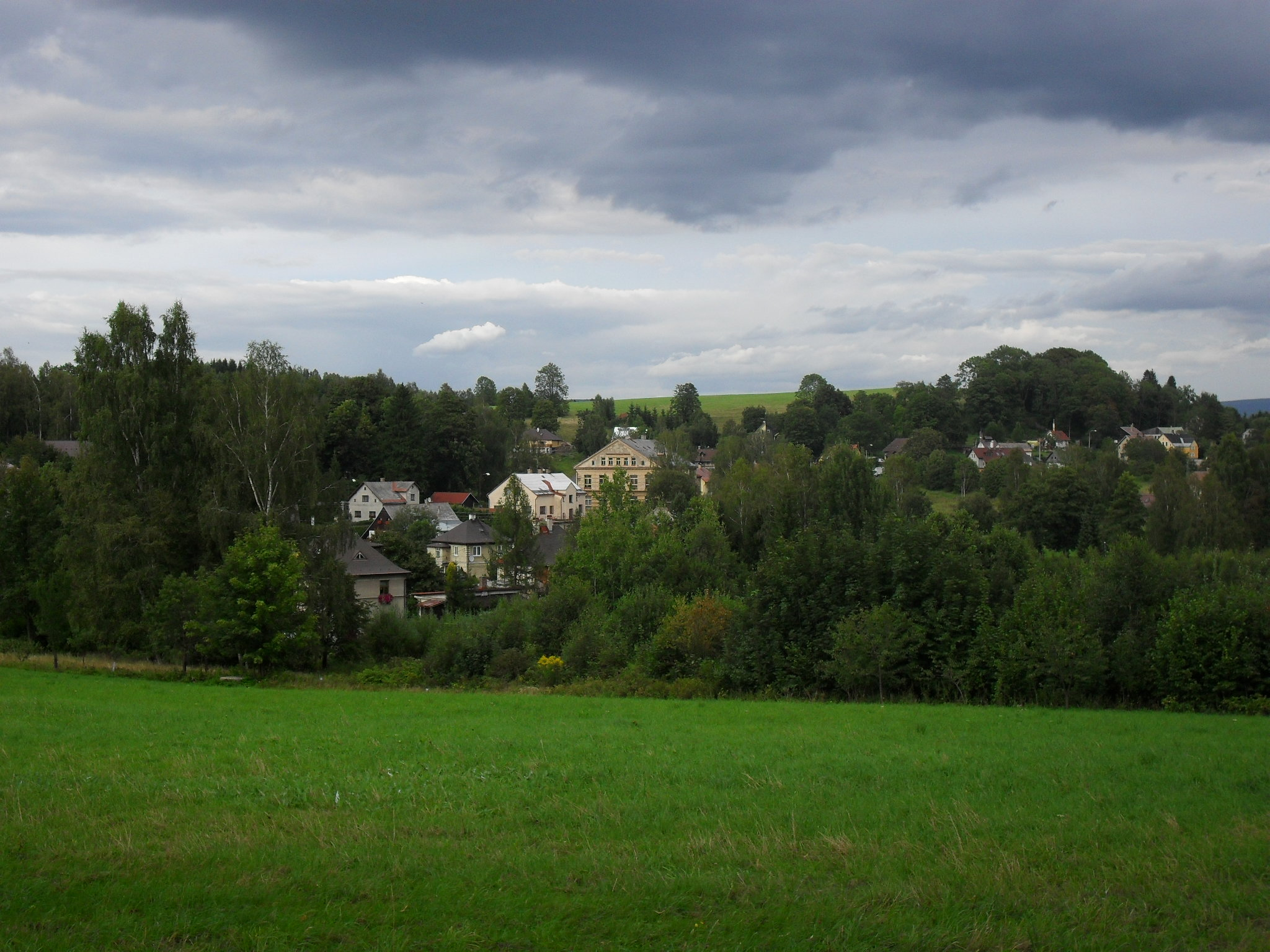 Pohled na Novou Ves nad Nisou od kostela Panny Marie Pomocnice křesťanů